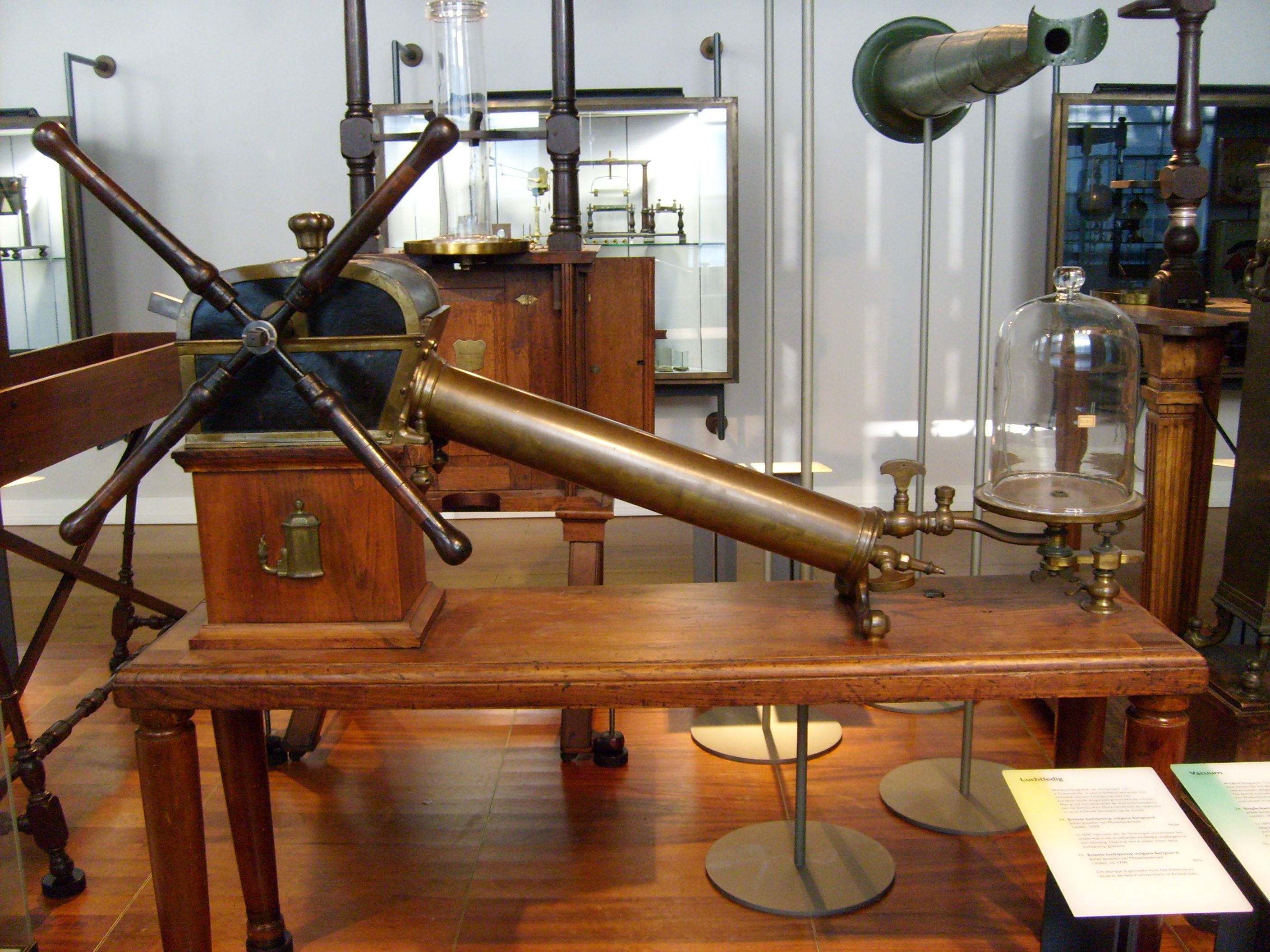 Following a design by Wolferd Senguerd 1698, Leiden Museum Boerhaave, Leiden